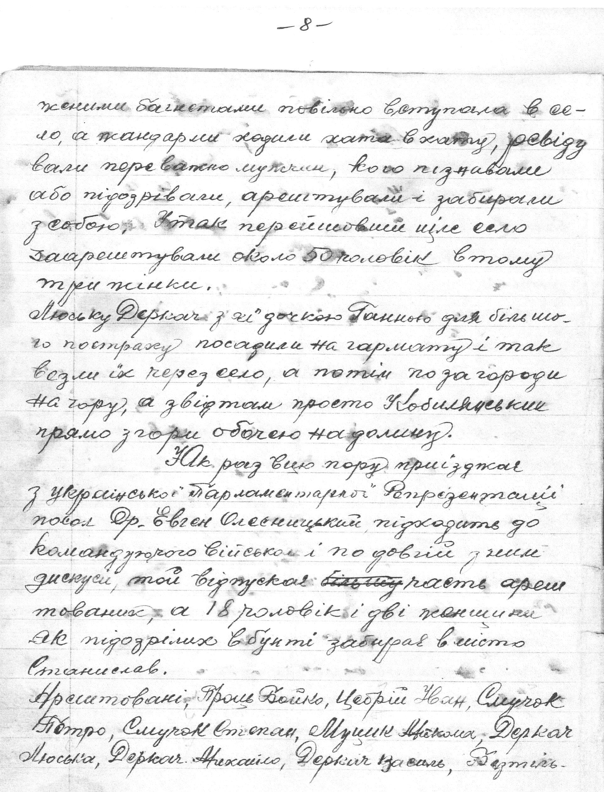 Копія рукопису